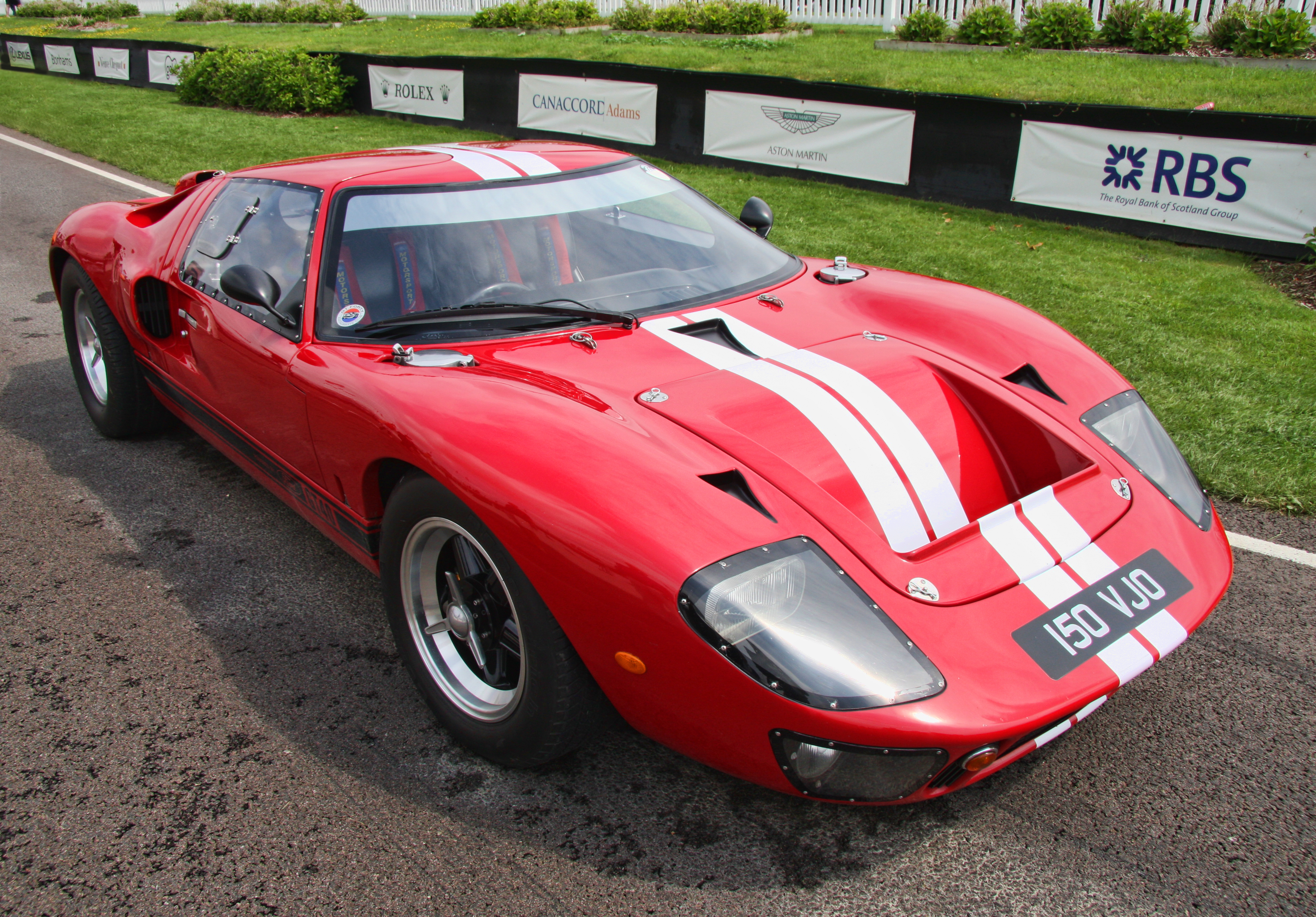 Tornado replica GT40